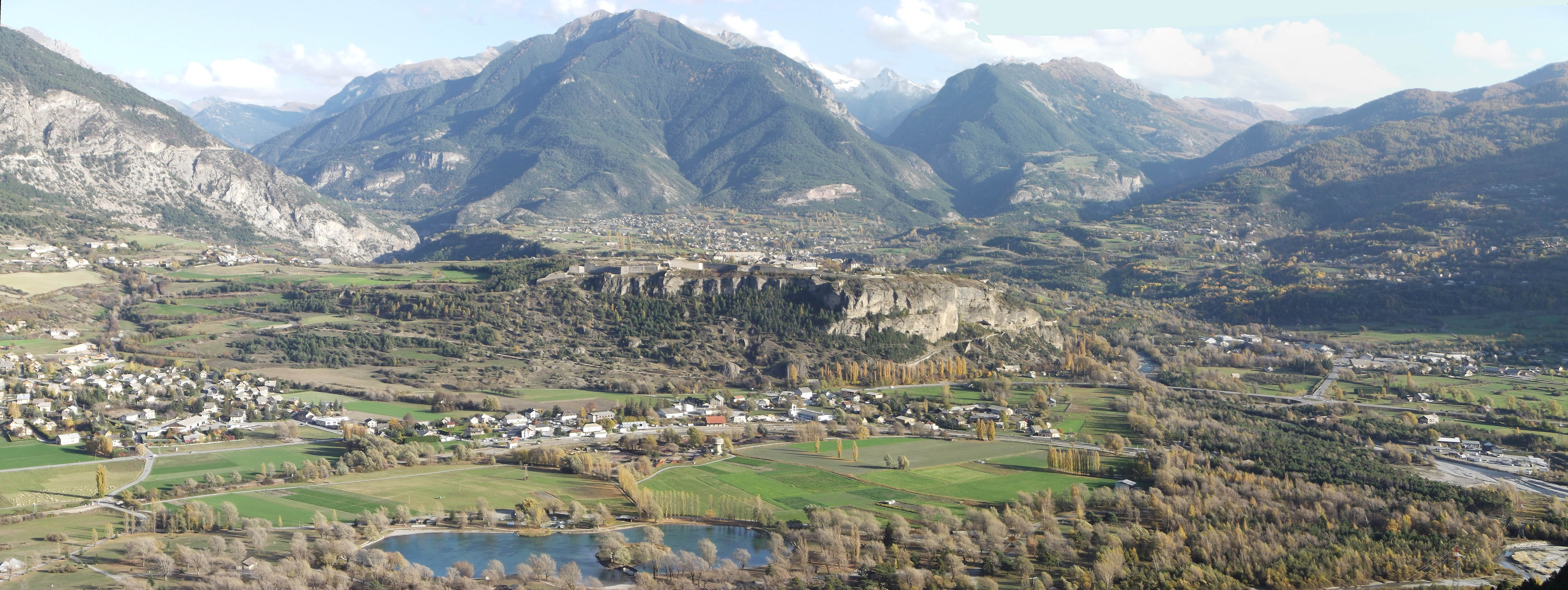 Vue sur Montdauphin, Guillestre, Eygliers et les montagnes alentours depuis Réotier (L'Aiguille)